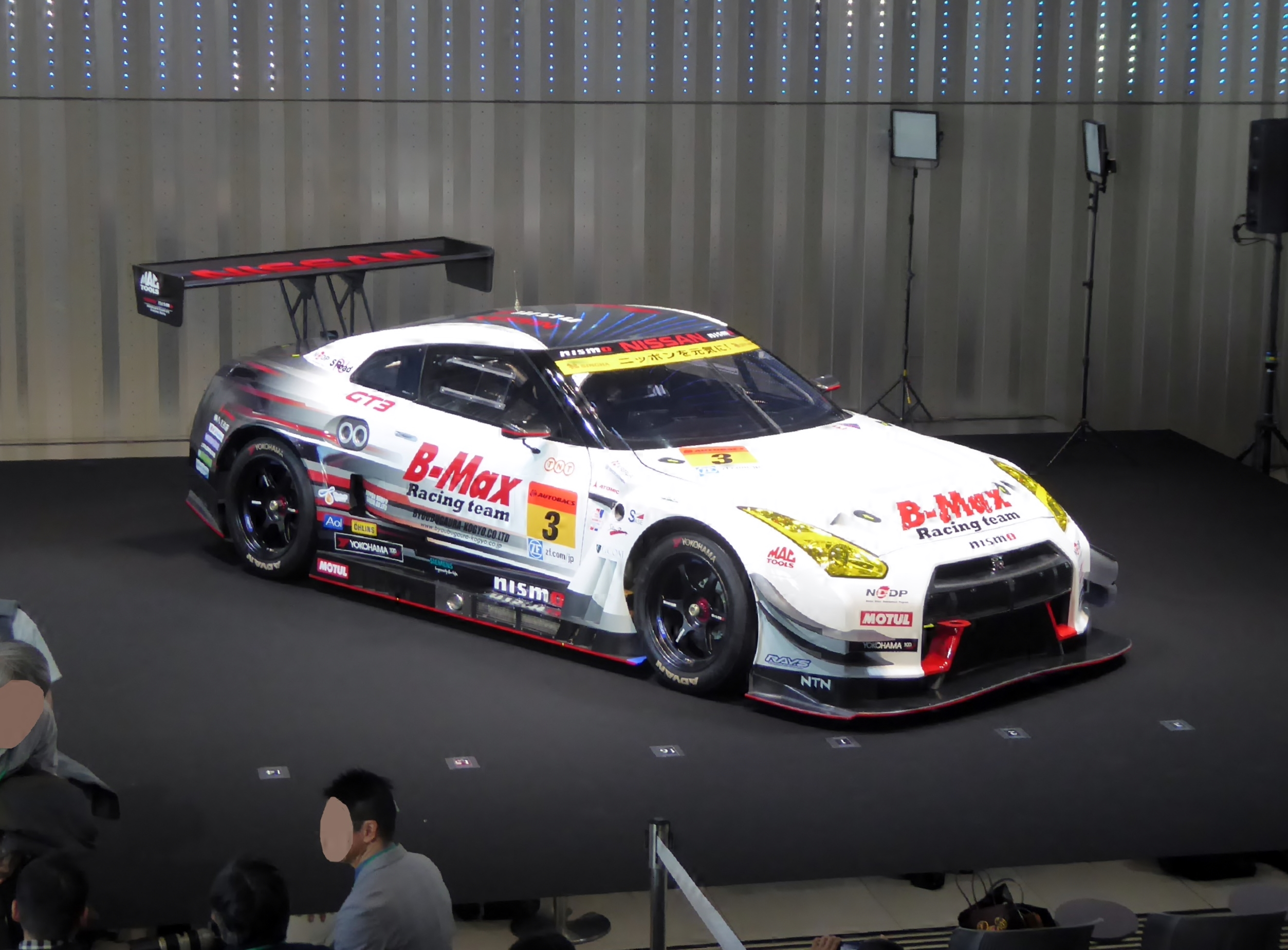 日産グローバル本社ギャラリーにて3号車B-MAX NDDP GT-Rの2017年仕様を撮影。